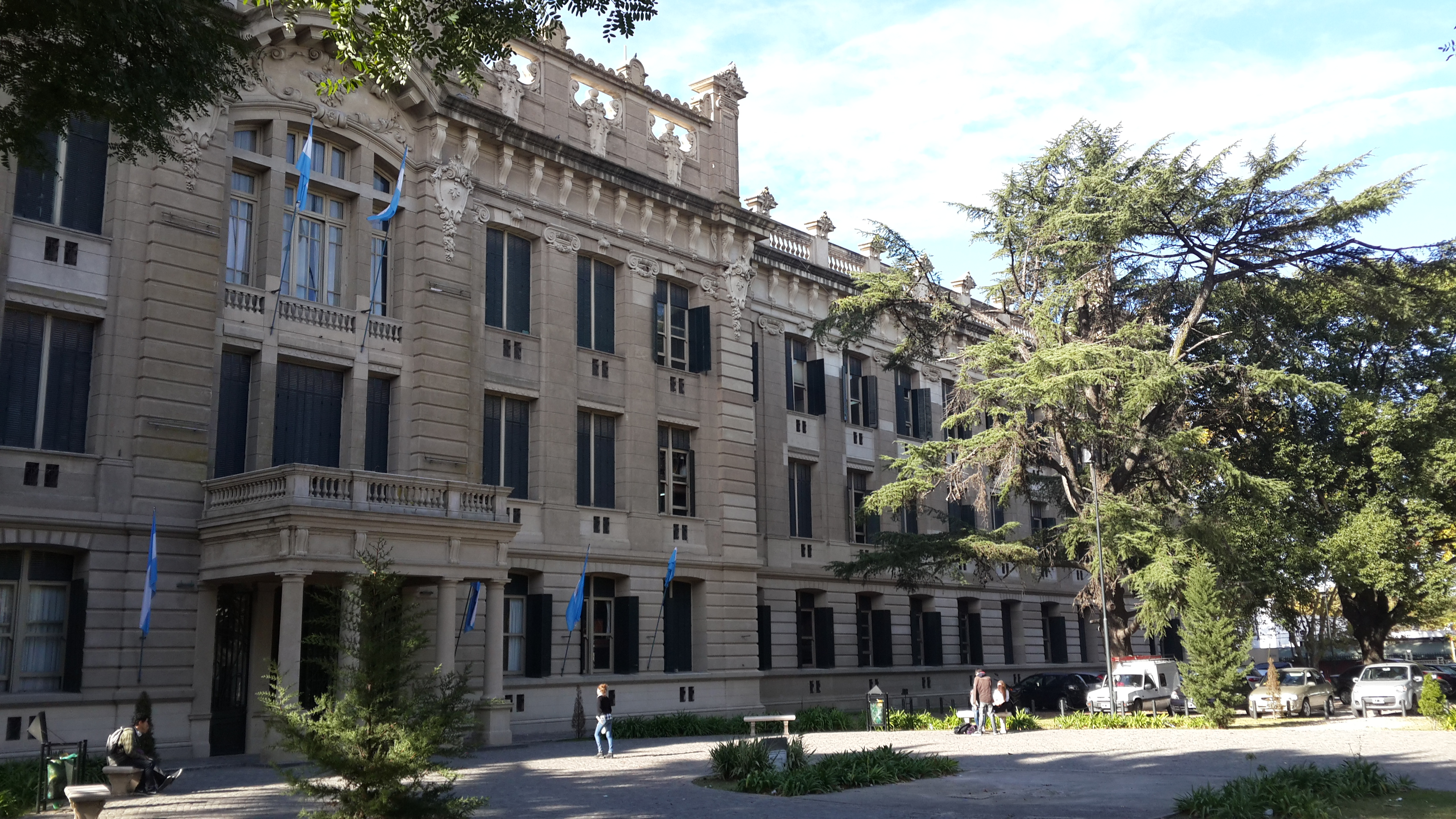 Fachada del colegio nacional un lunes por la tarde